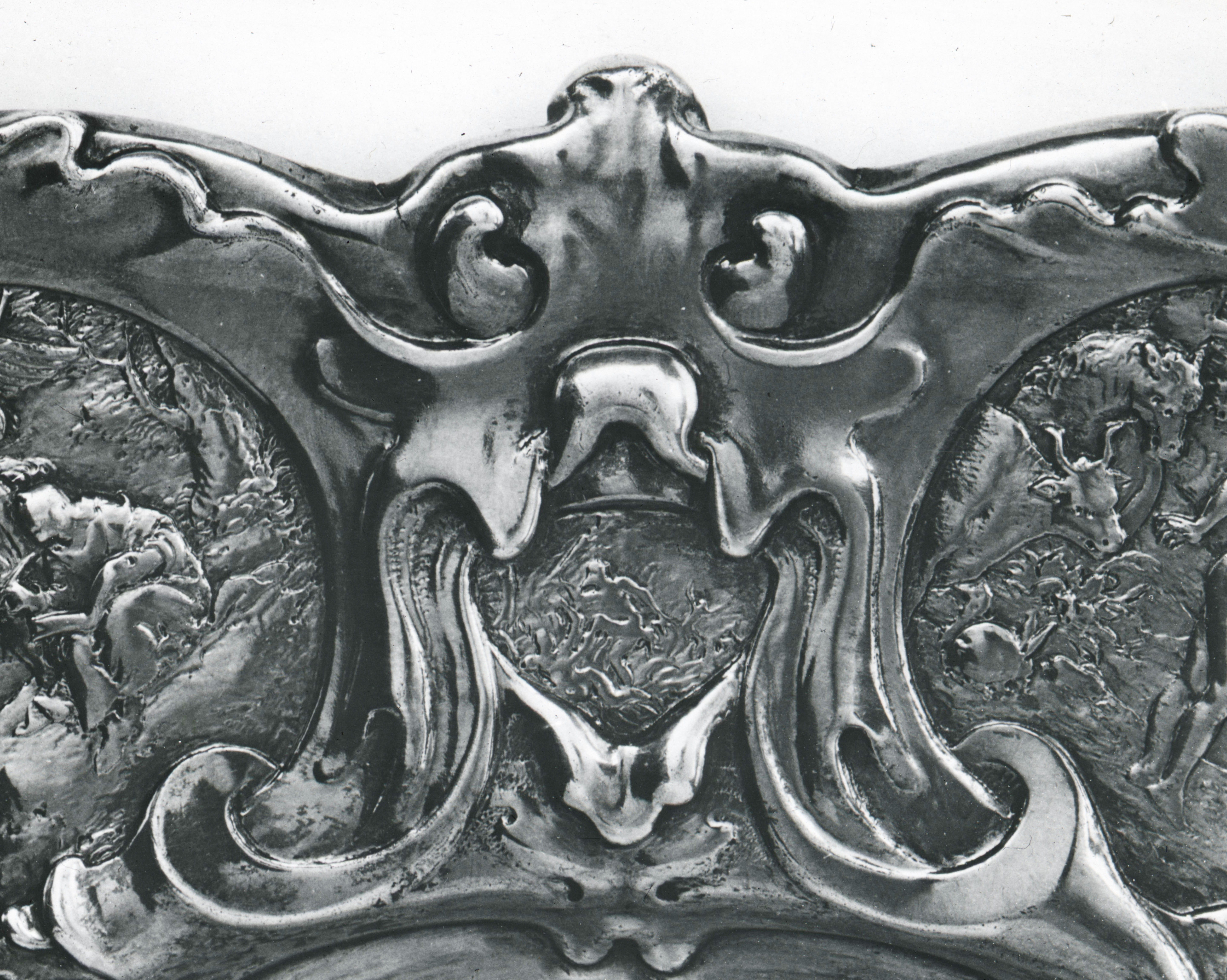 Detail schaal Lutma de Oude in Halwyll